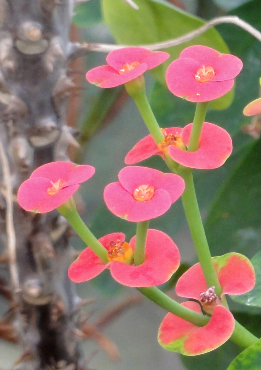 Euphorbia milii